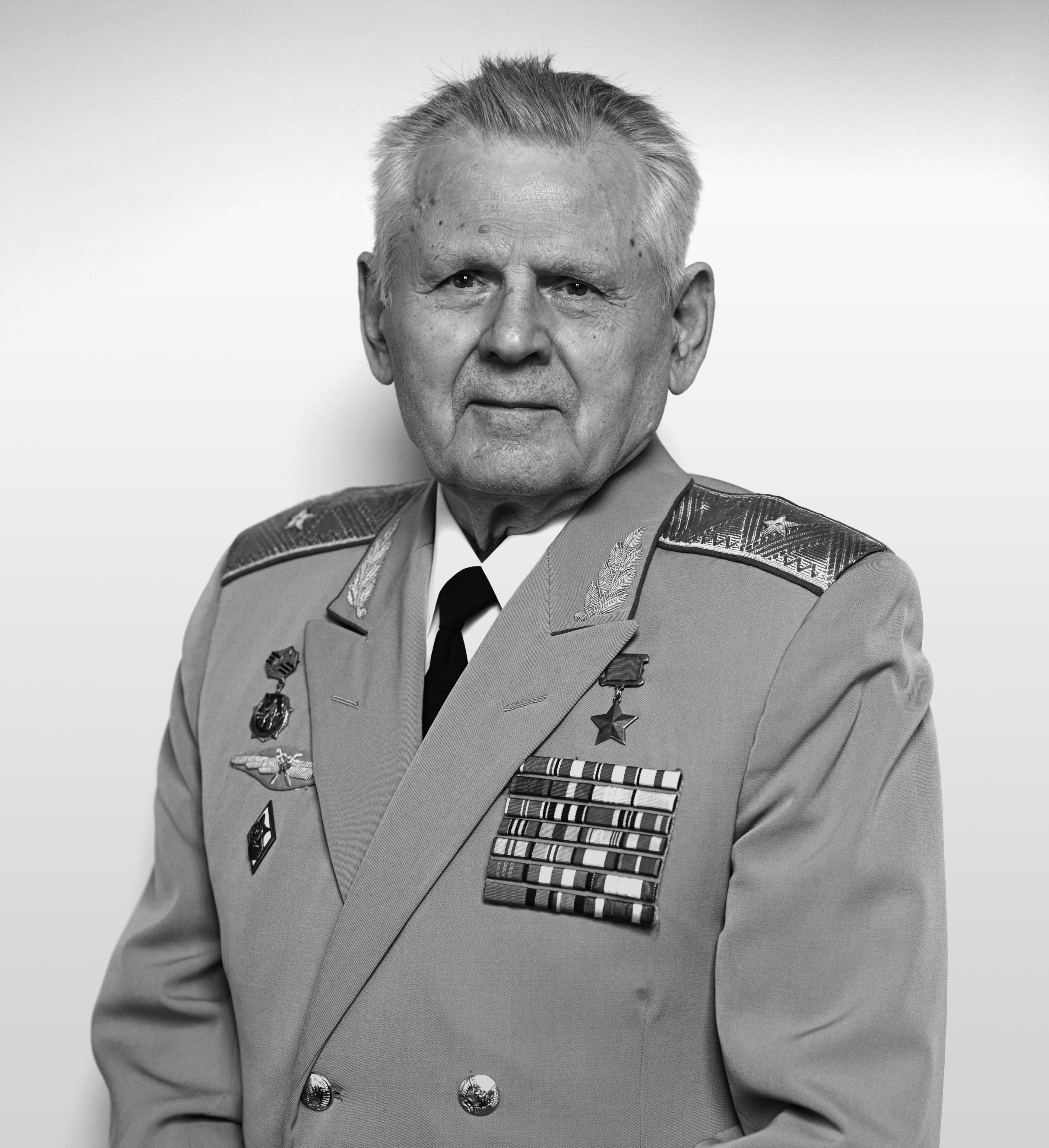 Артеменко Анатолий Павлович. Портрет сделан в возрасте 95 лет.